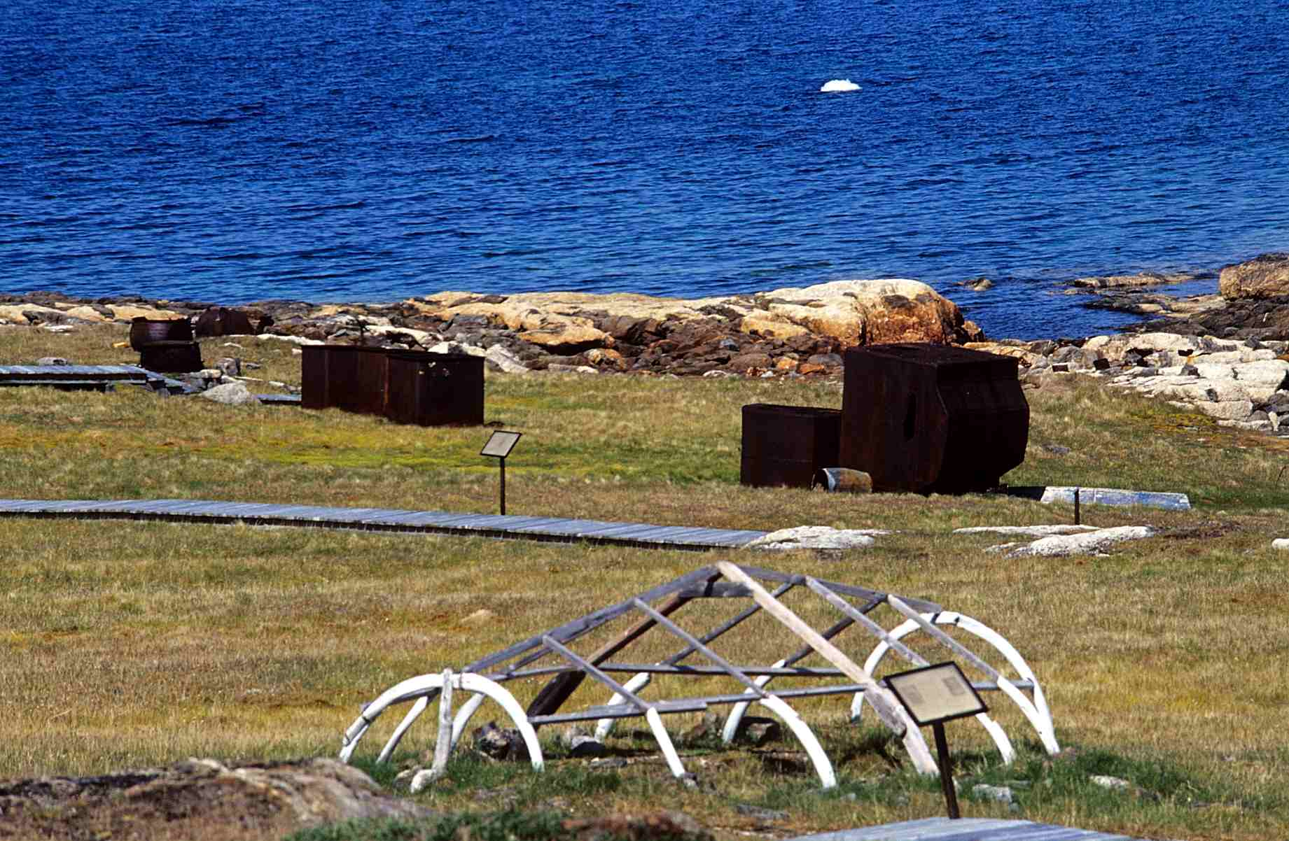 Kekerten Historic Park, wo Relikte der zwischen 1840 und 1920 betriebenen Walfangstation auf Kekerten Island (Qikiqtan) zu besichtigen sind